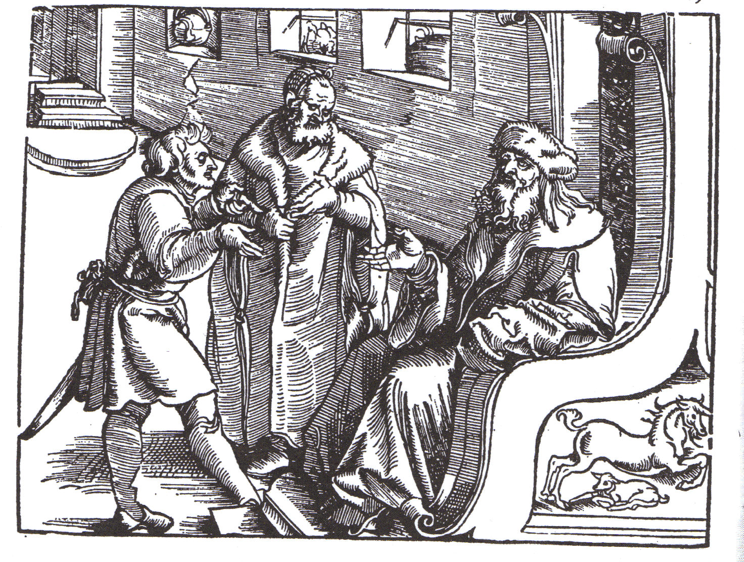 Marquard von Lindau: Frag vnd Antwurt der zehen gebott, Straßburg 1516 - VD16 M 1076. Holzschnitt von Hans Baldung Grien